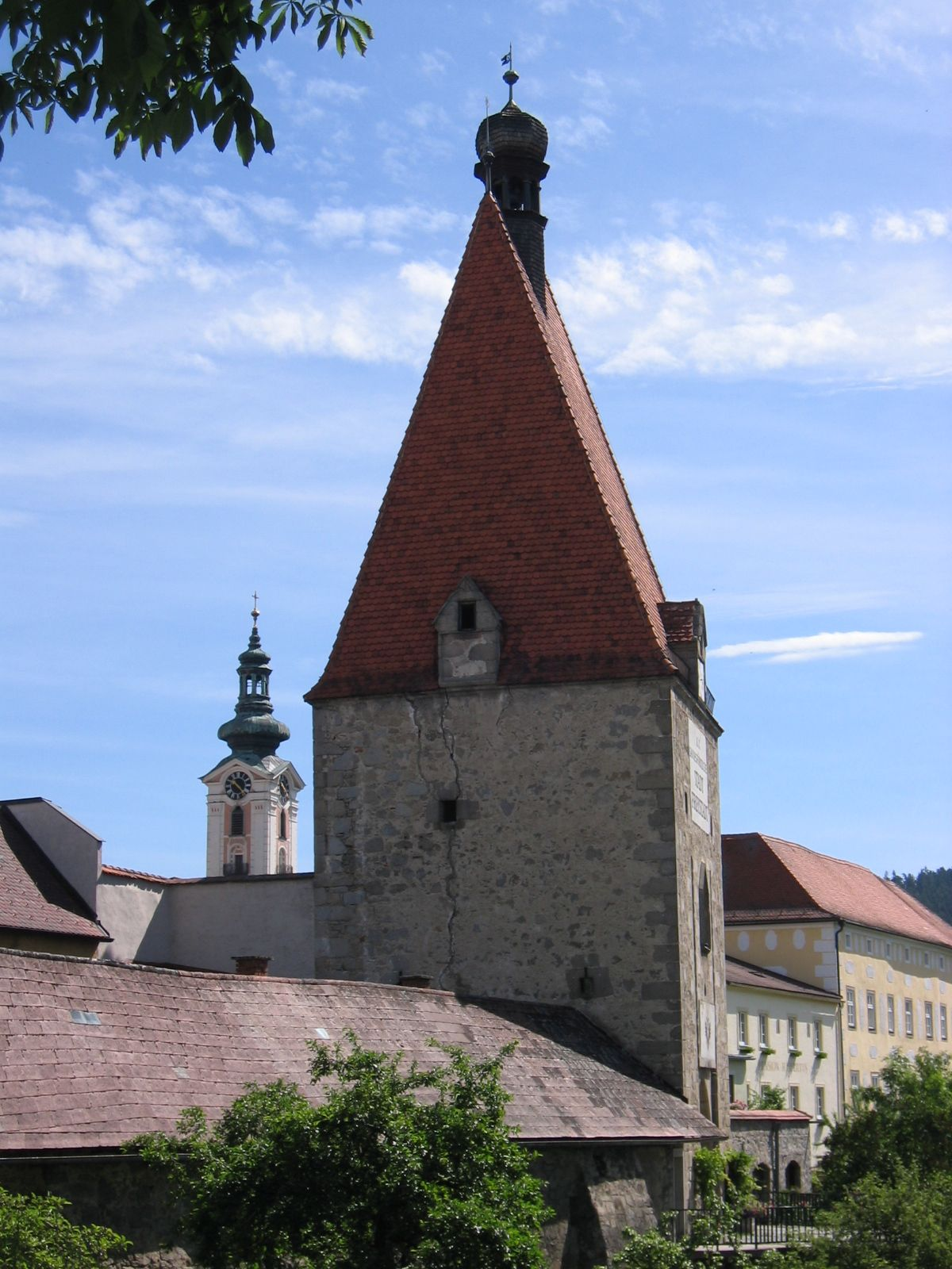 Linzertor